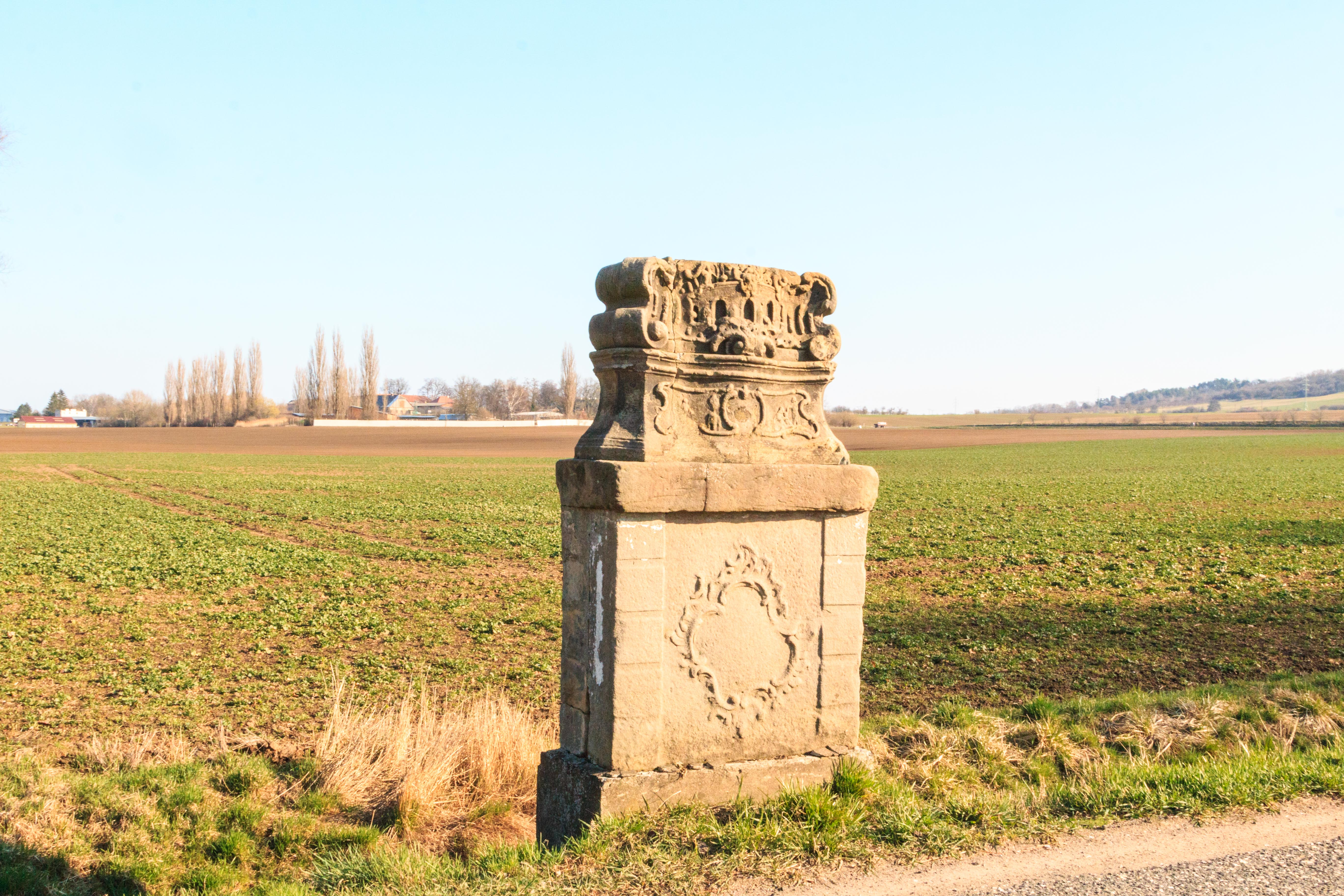 Pískovcové pilíře s reliéfy u Březiny